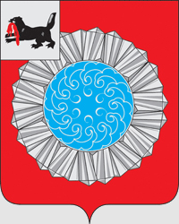 Герб города Слюдянка